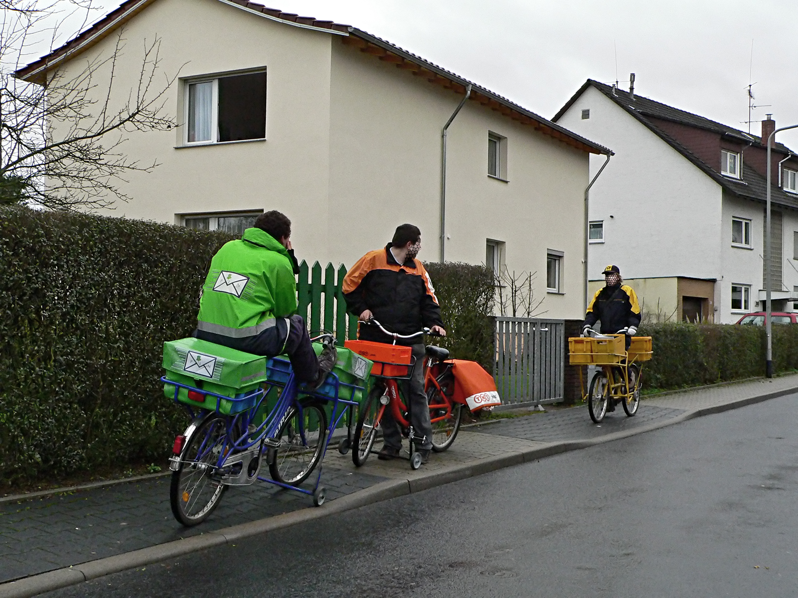 Drei Postzusteller von PIN, TNT und Deutscher Post mit Postfahrrädern in Frankfurt am Main